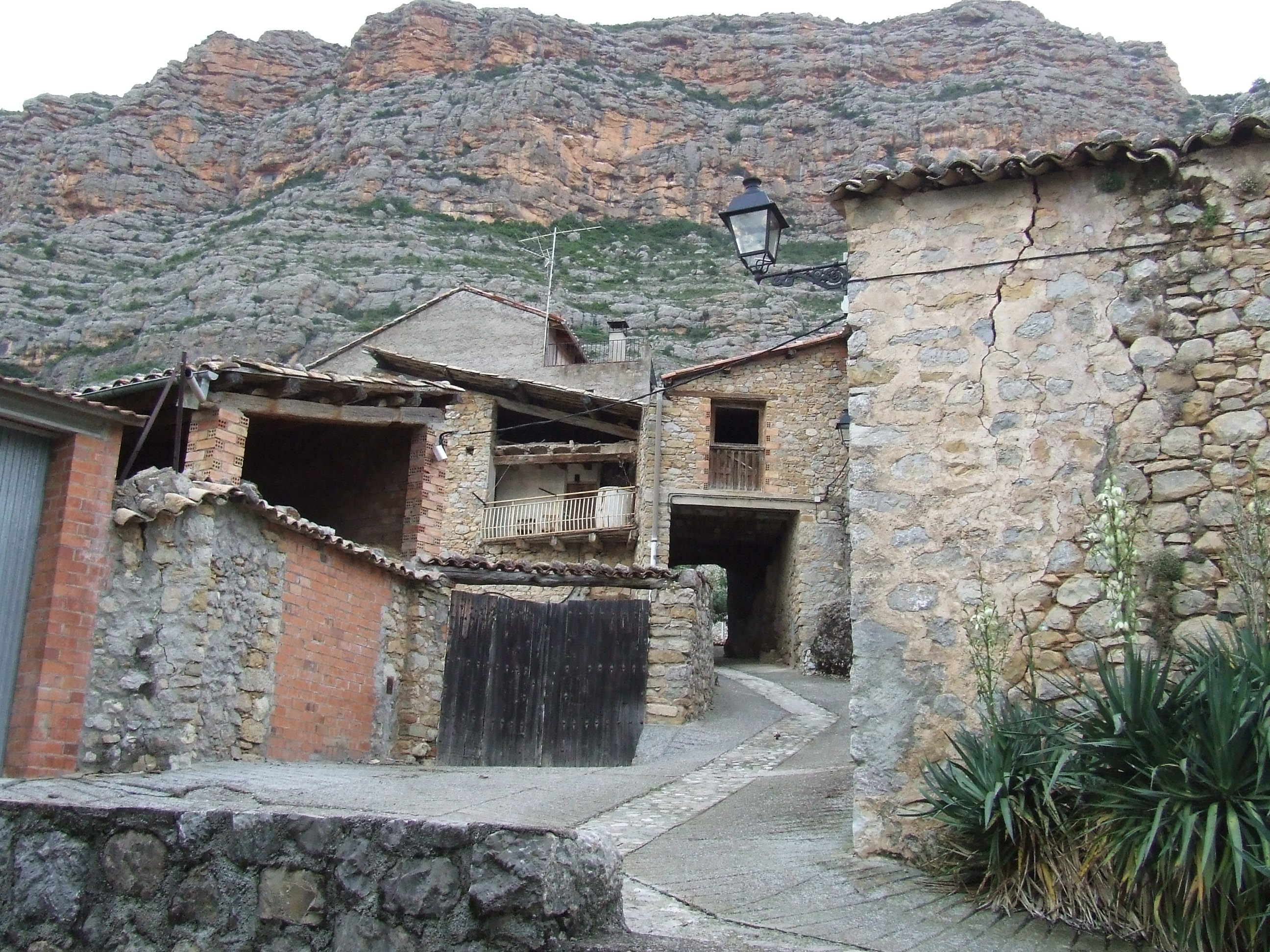 El camí d'entrada a Pessonada des d'Aramunt i el Roc de Pessonada al fons (Hortoneda de la Conca, Conca de Dalt, Pallars Jussà)